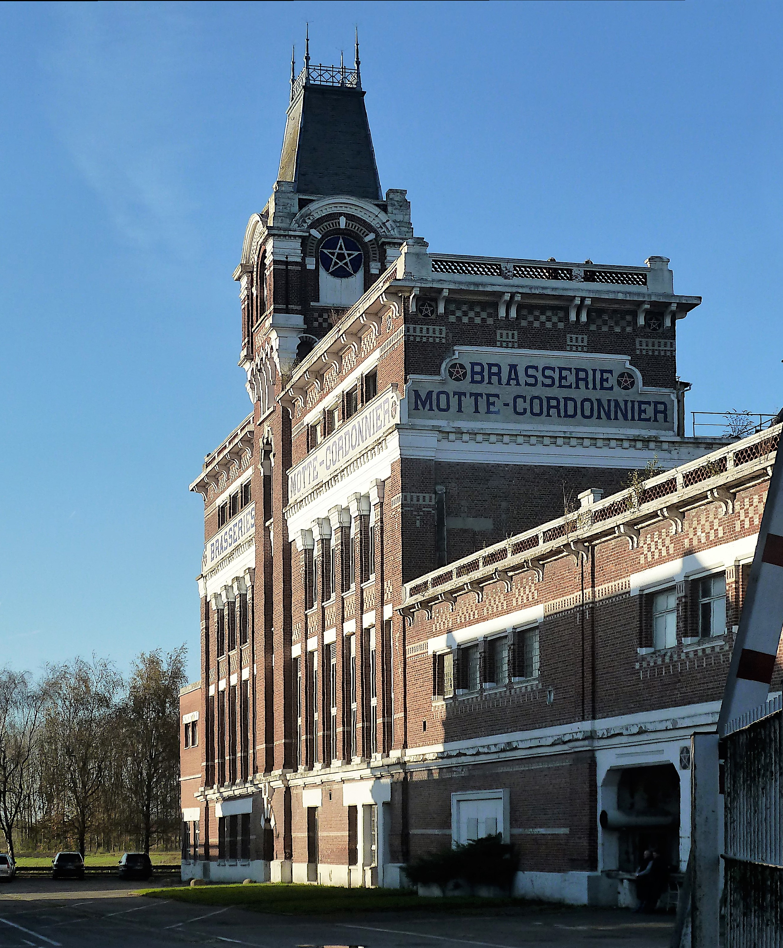 Armentières L'ancienne brasserie Motte Cordonnier, Nord, France .